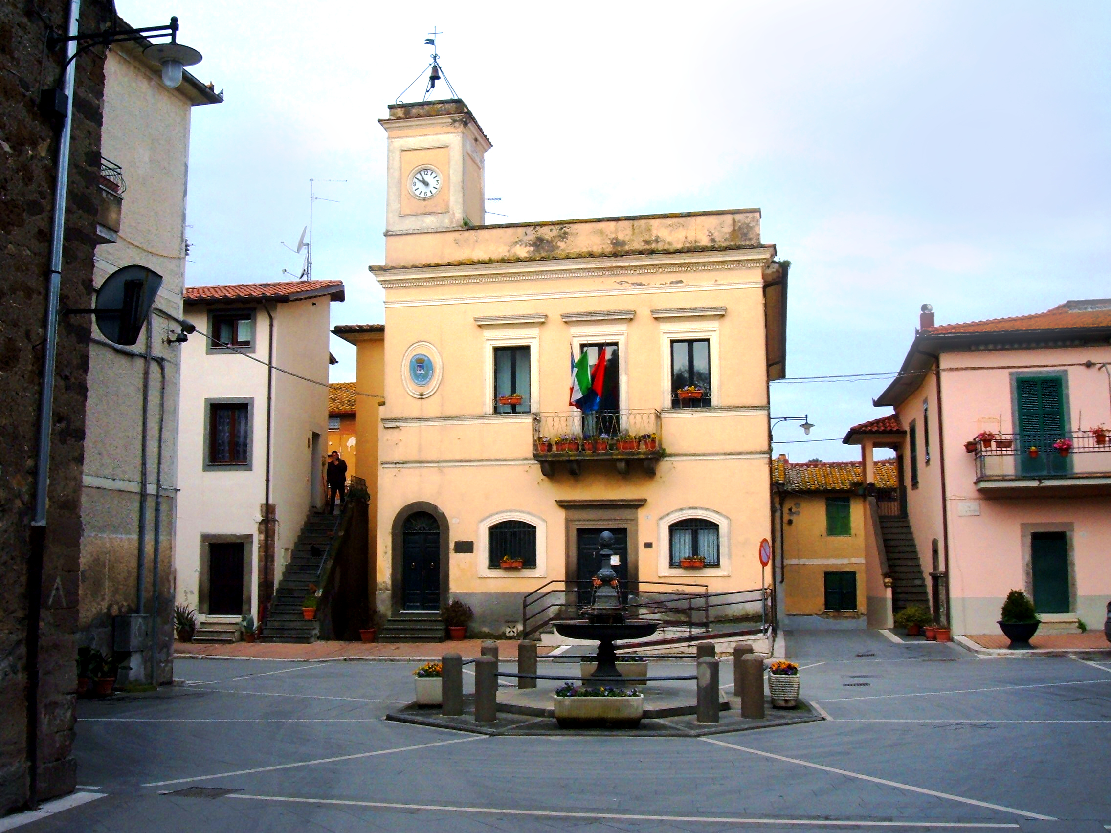 Palazzo comunale di Villa San Giovanni in Tuscia (VT)